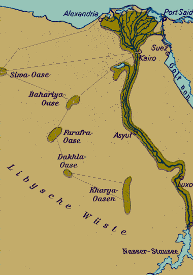 Karte der Libyschen Wüste, selbst reorganisiert und verändert.